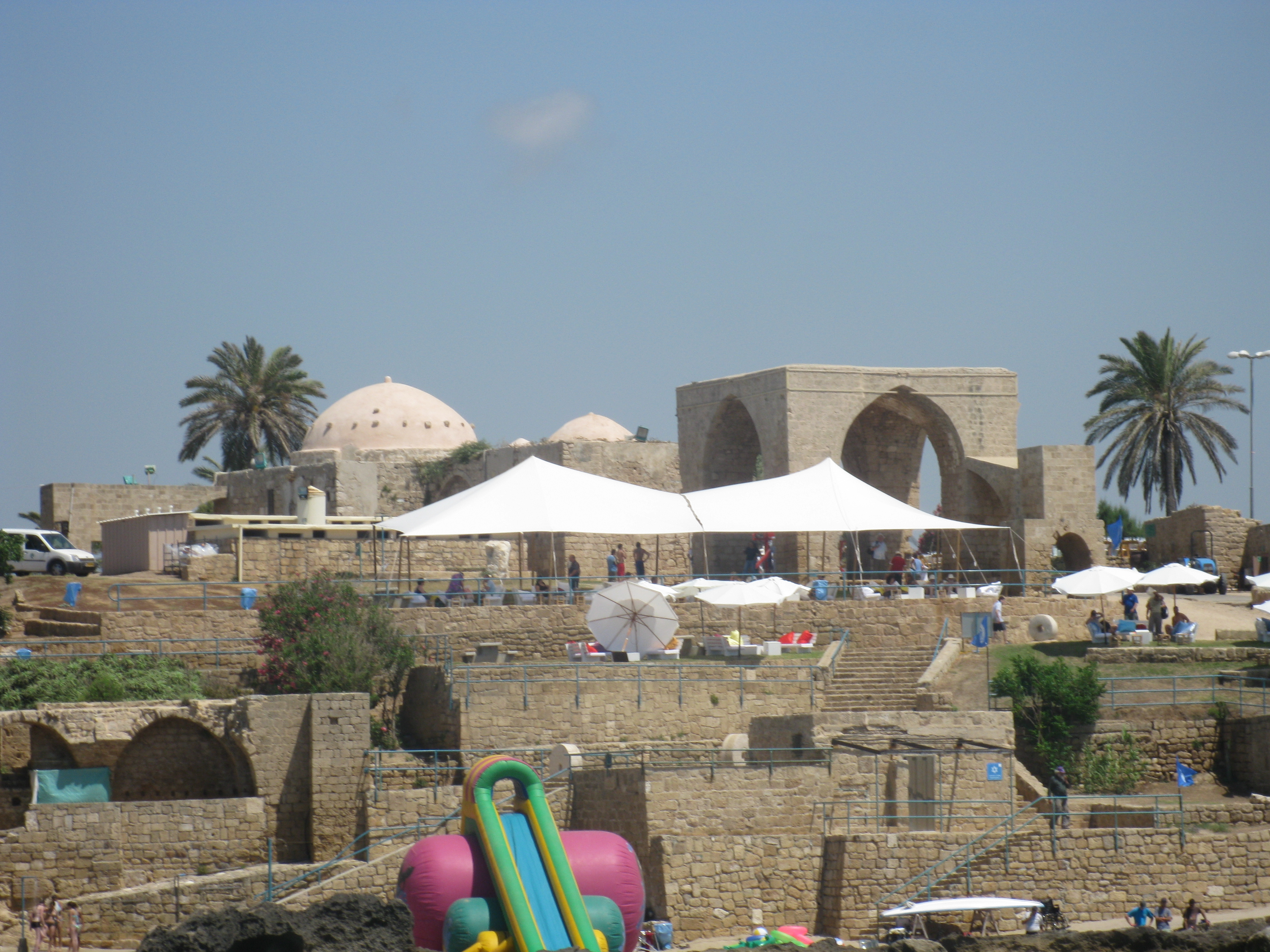 Achziv Beach חוף אכזיב